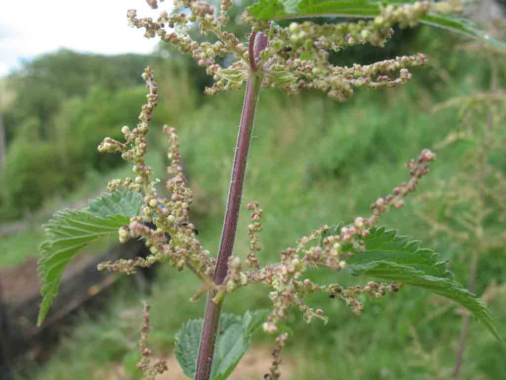 photo de fleurs males de Urtica dioica